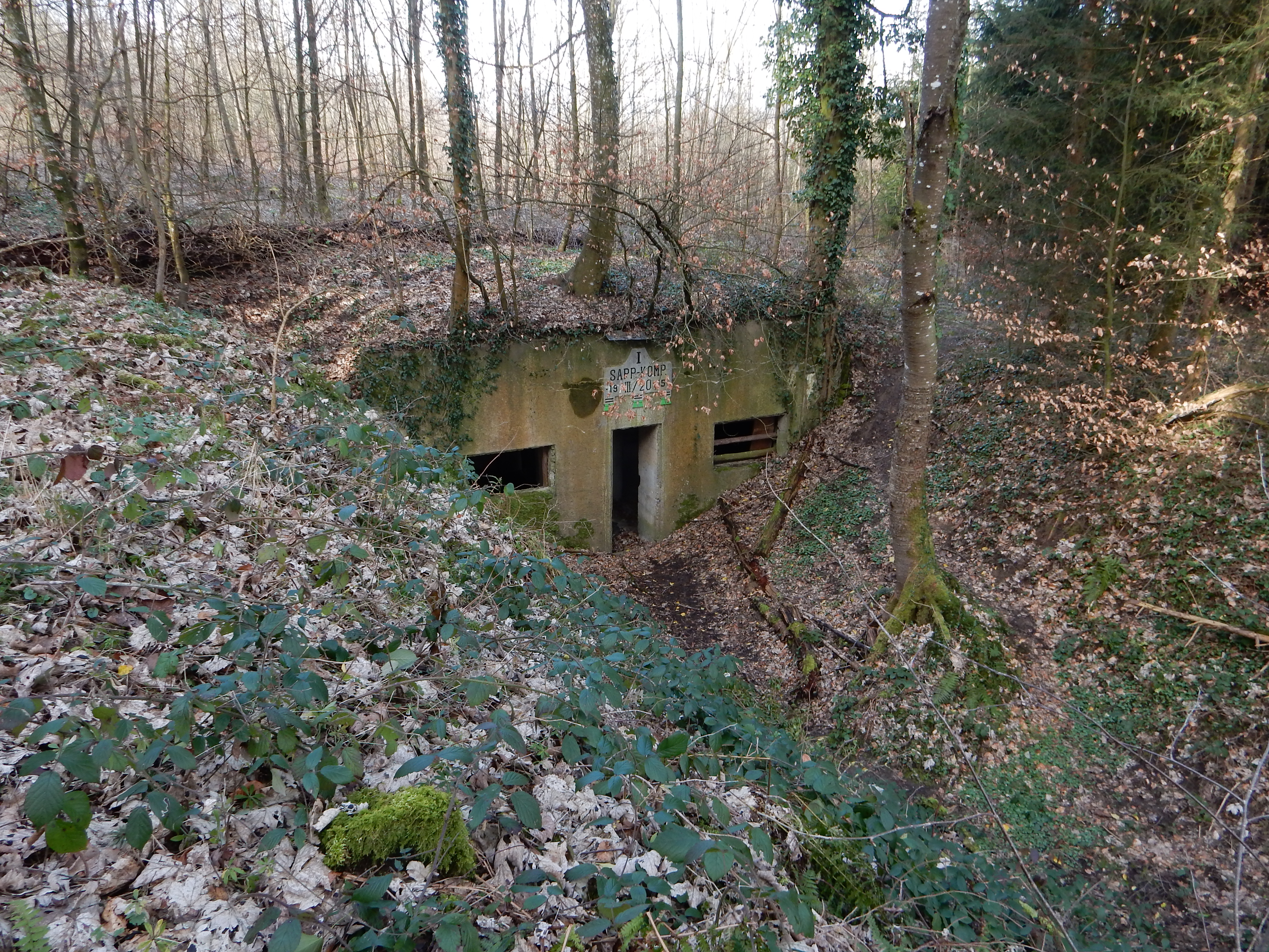 Bunker im Staatswald Galm, Kanton Freiburg, Schweiz